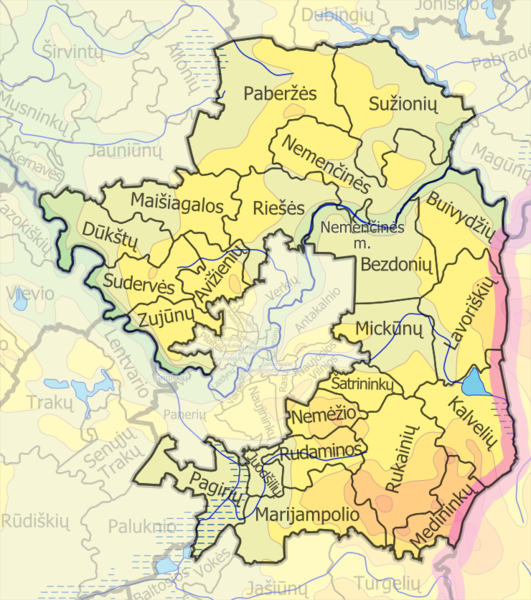 Gmina Wilno, podział administracyjny